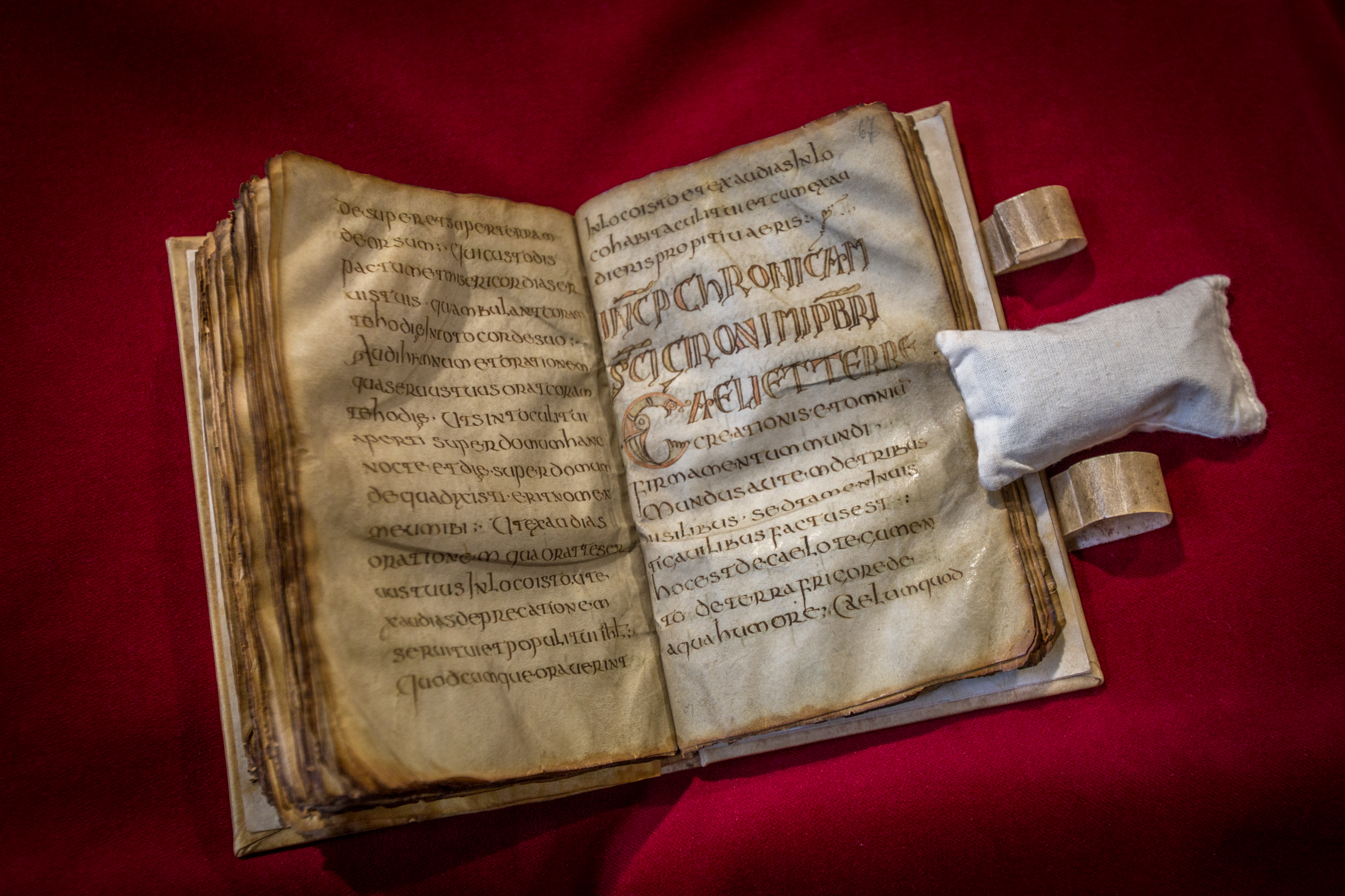 Lectionnaire mérovingien (VIIème siècle). Manuscrit sur parchemin. Le plus ancien livre conservé en Alsace. (Ms 1). Coll. Bibliothèque humaniste de Sélestat.